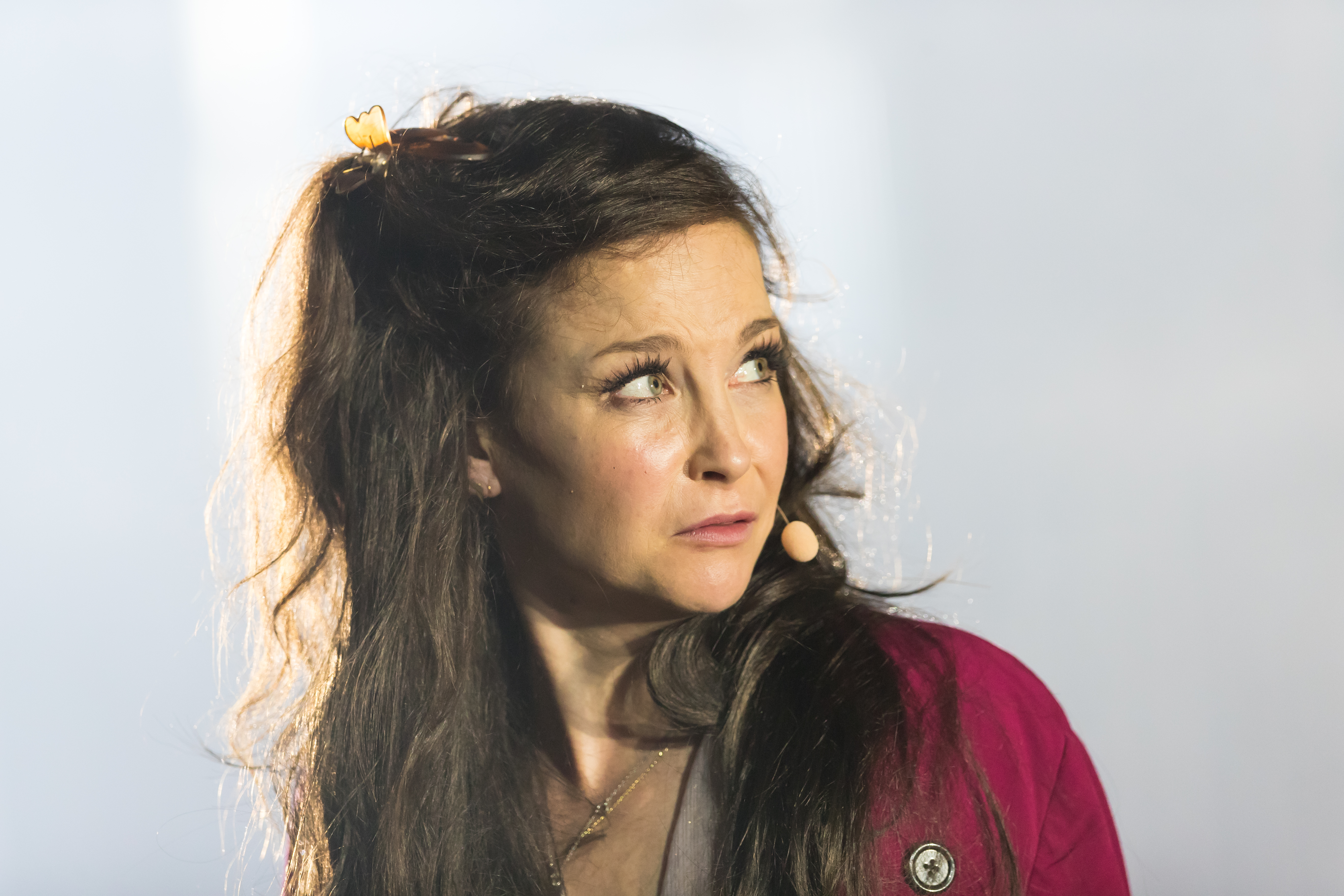 Valerie Koch during Nibelungenfestspiele "GLUT. Siegfried von Arabien." at Rheinland-Pfalz, Worms, , Germany on 2017-08-01, Photo: Sven Mandel